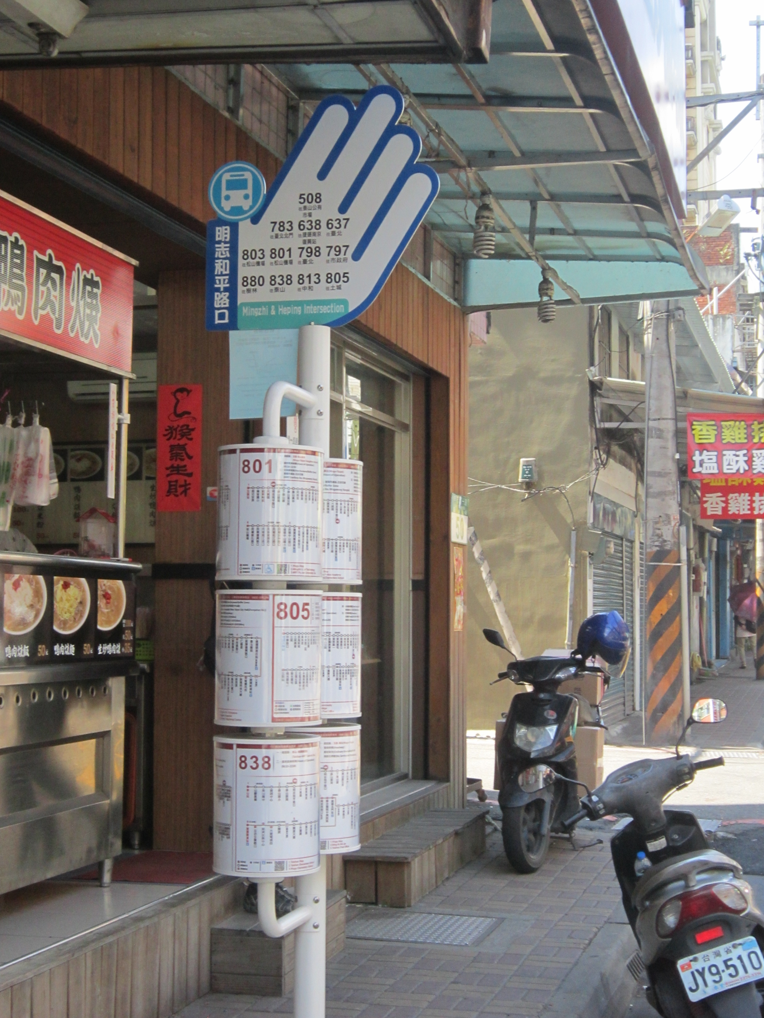 新北市轄內的聯營公車新款設計的候車站牌「明志和平路口」